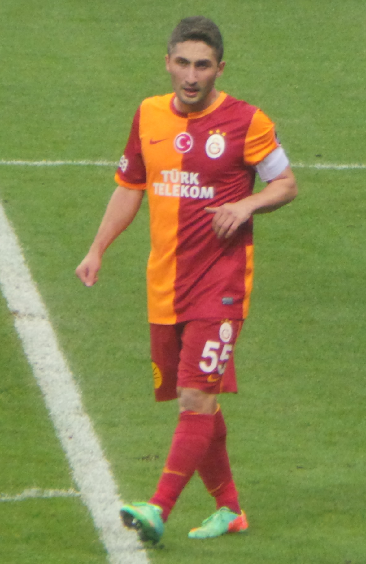 Sabri Sarıoğlu '13-14